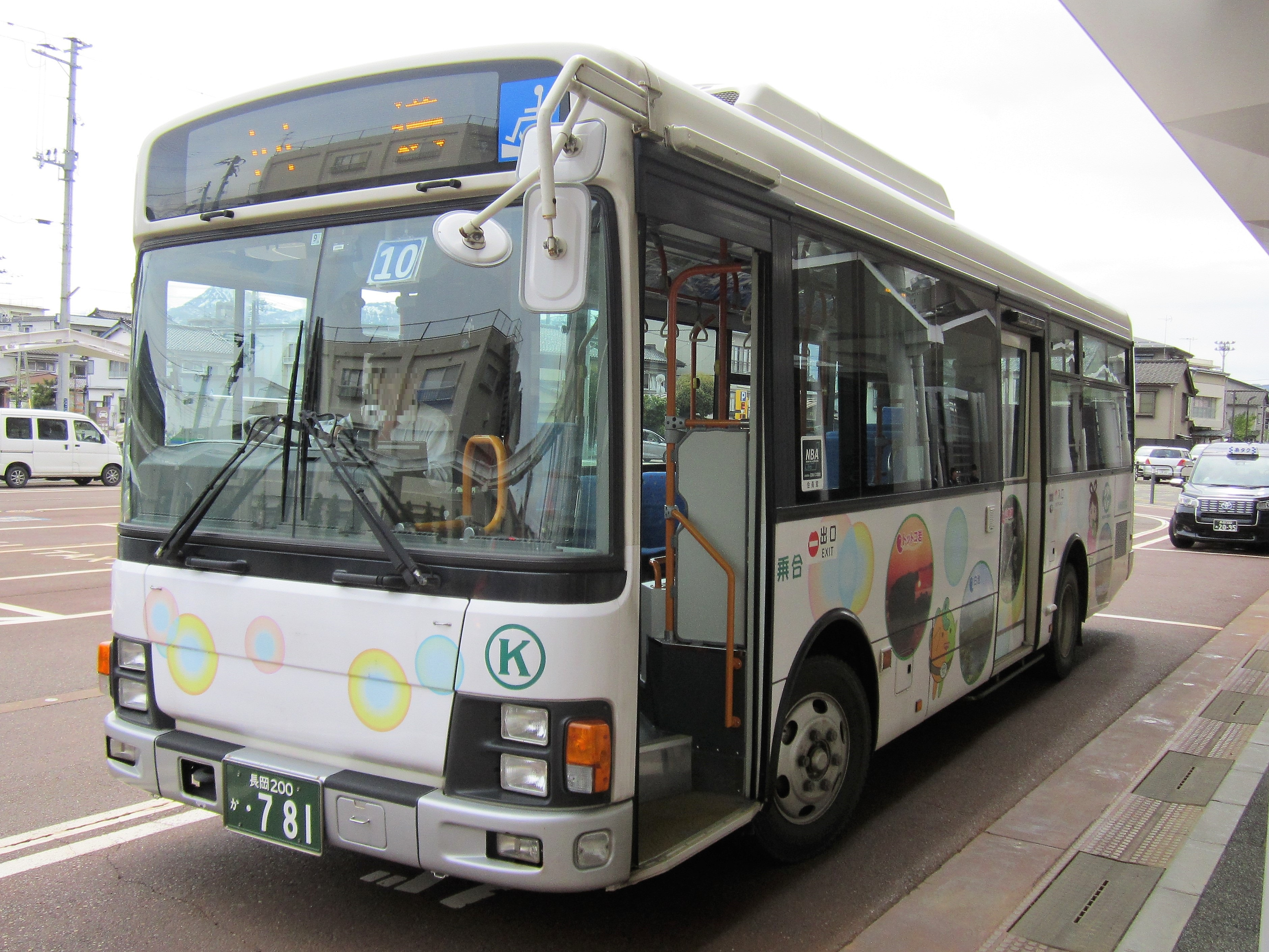 糸魚川駅アルプス口に停車中の糸魚川バス Canon PowerShot A2200